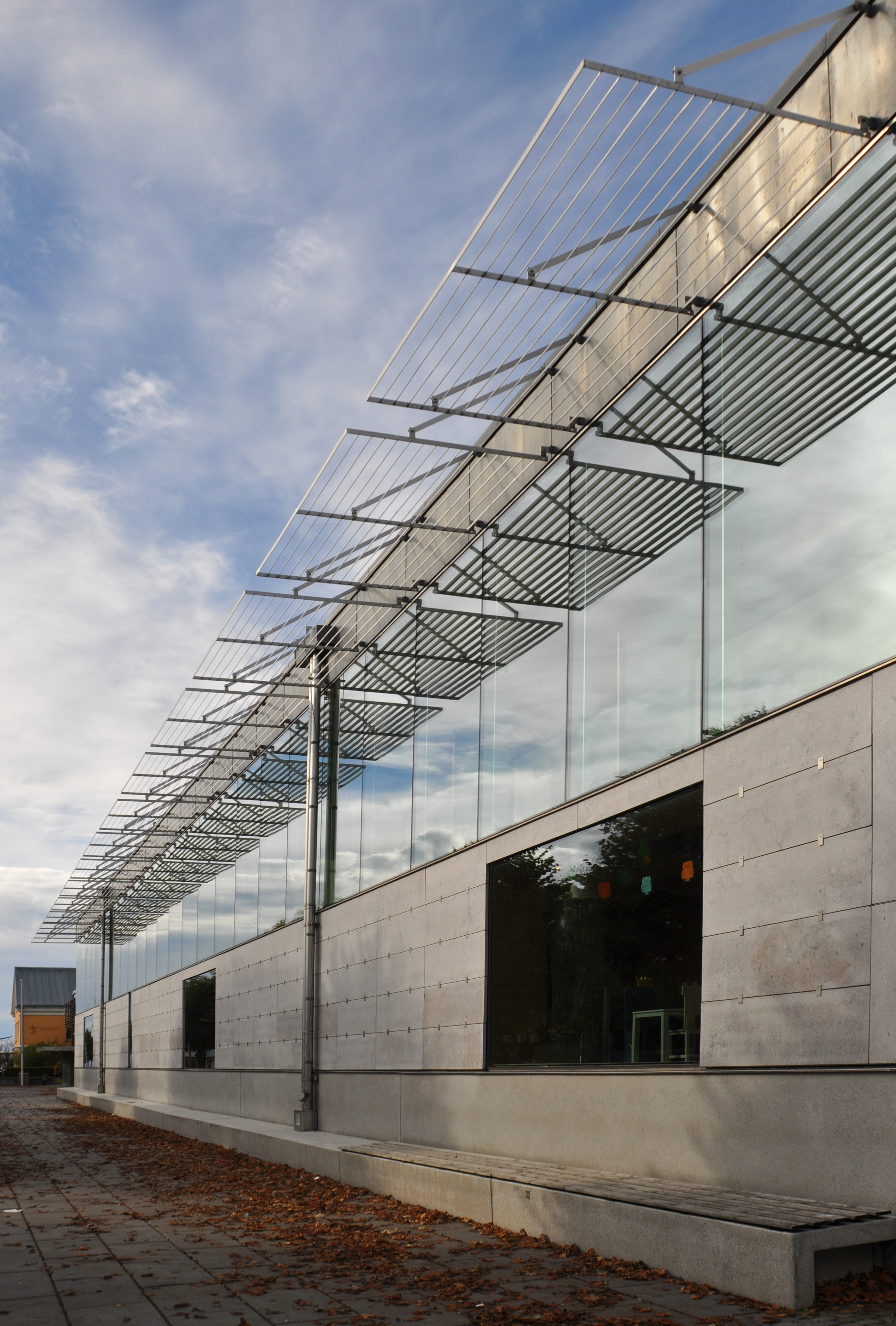 Almedalsbiblioteket av Christer Malmström och Anders Grape invigdes 2001 i Visby.